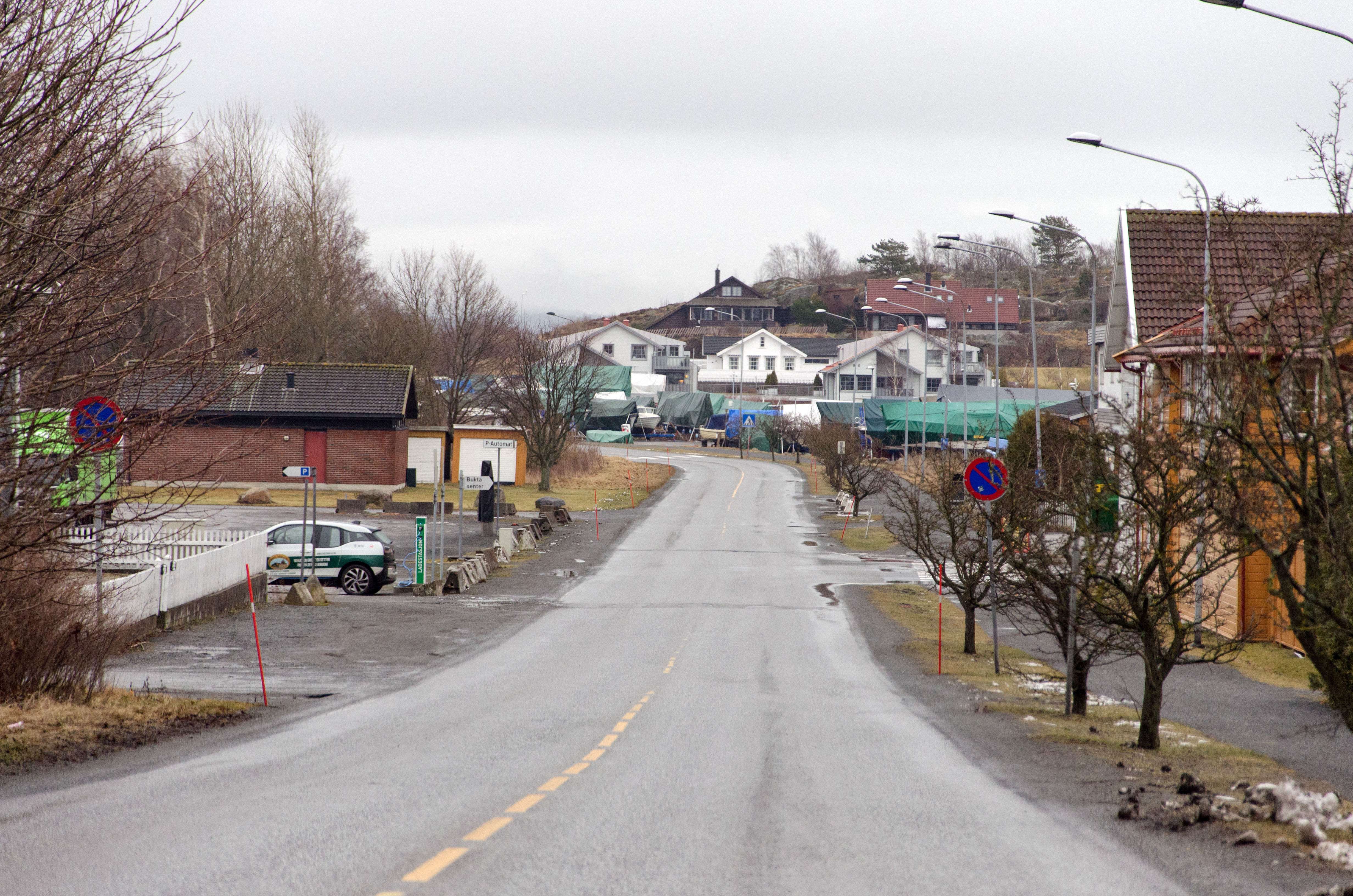 Fylkesvei 42 Risøyveien i Stavern